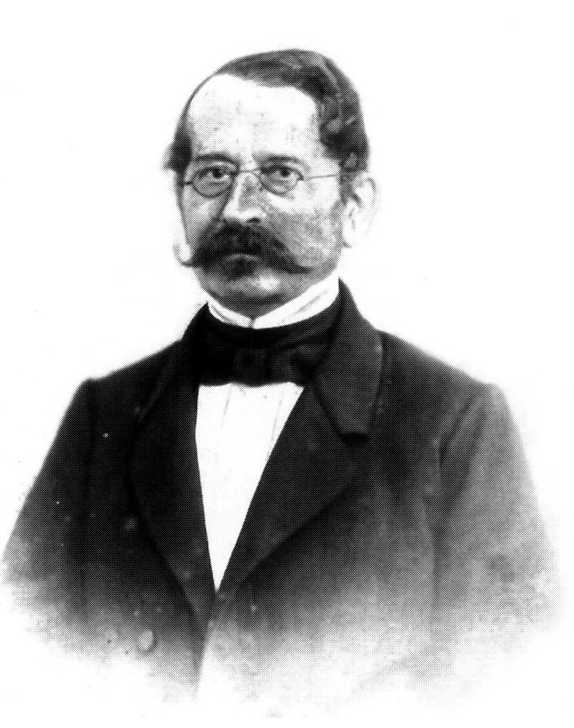 Franz Hirt (1811-1882), Landtagspräsident Reuß j. L.